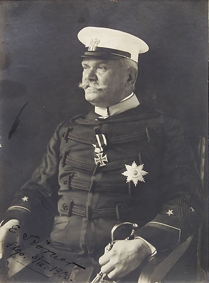 Retrato a Emilio Körner como comandante en jefe del Ejército de Chile